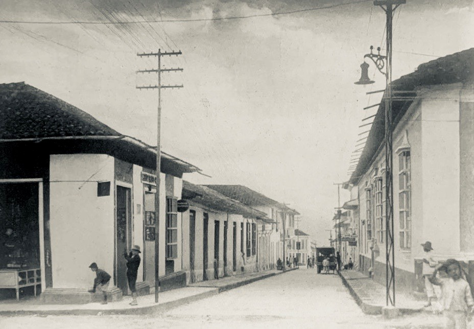 «Mérida: Calle de la Independencia. Una cuadra de dicha calle pavimentada recientemente. - Administración del General Don José R. Dávila».